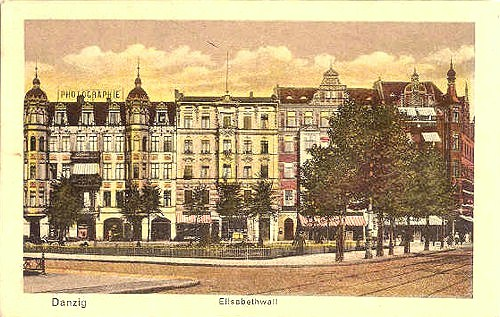 Ulica Wały Jagiellońskie w Gdańsku - część północna (dawna ulica Elisabethwall).